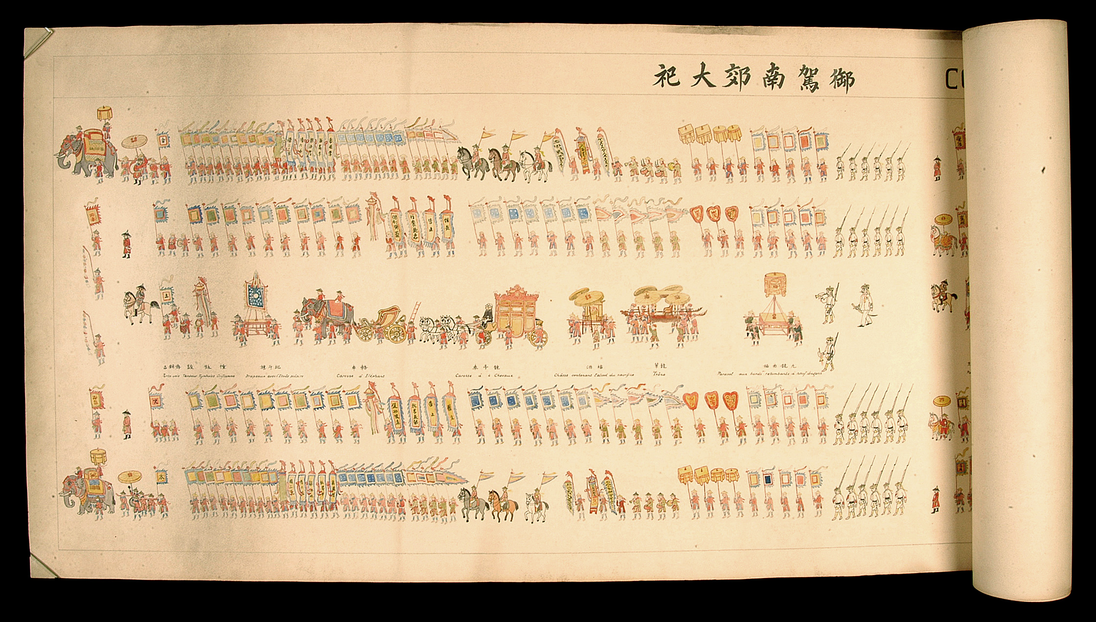 Ngự giá Nam giao đại tự đồ và trích-lược hồi ký Con rồng Việt Nam của Vua Bảo Đại. Thoạt đầu là một hàng voi choàng đầy phẩm phục lộng lẫy... theo sau là đủ hạng nhạc công... Trung quân là nơi quan trọng nhất, các thị vệ mang hèo, trượng, cùng các loại võ khí chỉ huy, hộ vệ... sau đó là những người vác cờ, biểu tượng của Thiên đình như cờ Đại hùng tinh, cờ Nhật Nguyệt và cờ Ngũ hành thuộc về Dịch lý. Nhà vua ngồi trong kiệu có các kỵ sĩ và phường nhạc xênh xang bao quanh. Ngự liễn được sáu người khiêng, được che bởi hai chiếc lọng lớn, một vị đại thần đi phò giá và hai hàng võ quan đi sát hai bên. Lính ngự lâm và cung thủ mang phủ việt đi hộ vệ. Sau đó đến các xe tay kéo các vị Thượng thư và quan dự tế. Hậu quân không mấy long trọng. Đó là đoàn quân mang các nhạc khí... một trống lớn, mười hai chiếc khánh đá, một chiếc cổ cầm... Đám rước đi thật thong thả, gồm khoảng trên hai ngàn người.